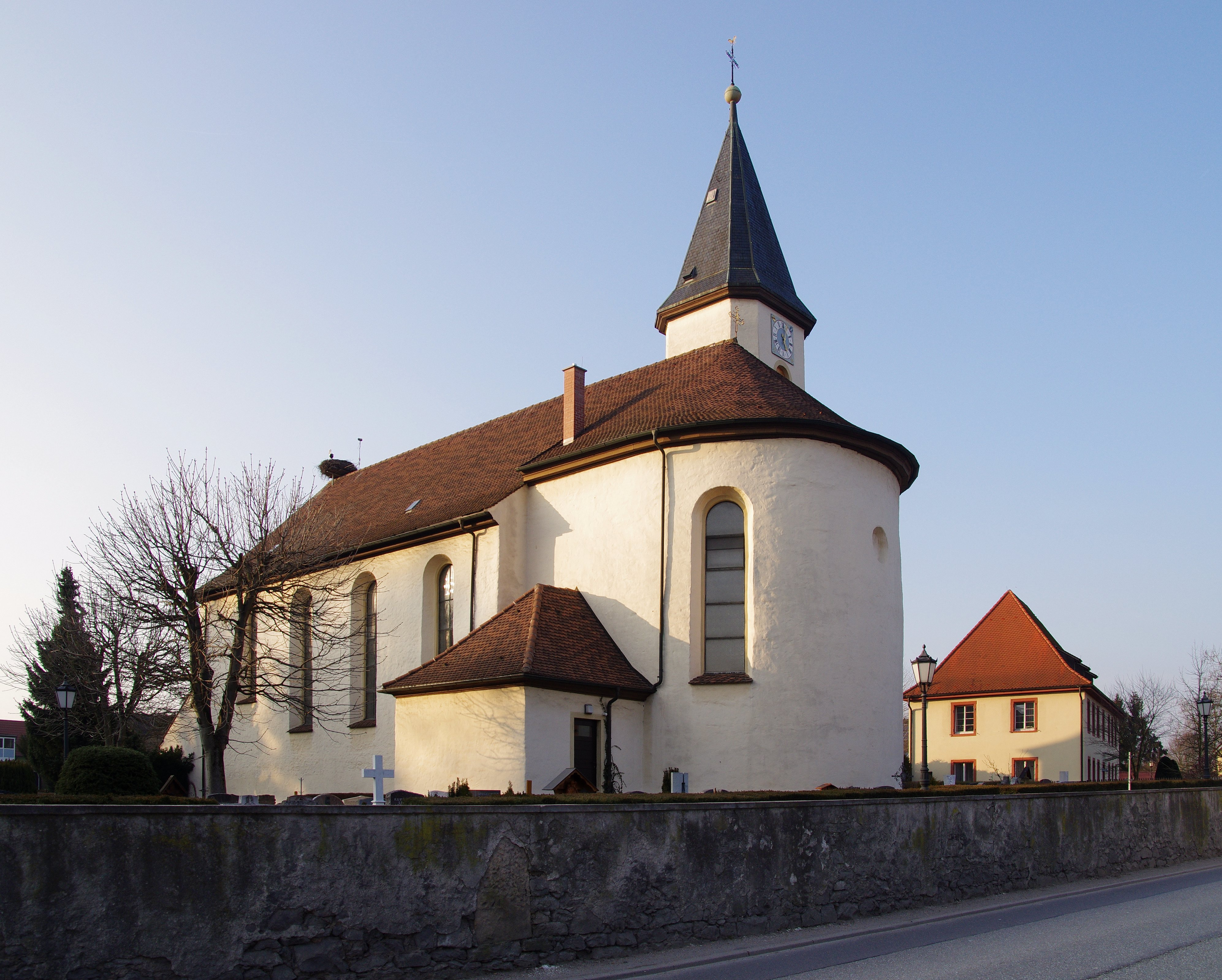 Die Kirche von außen Blick von Süden